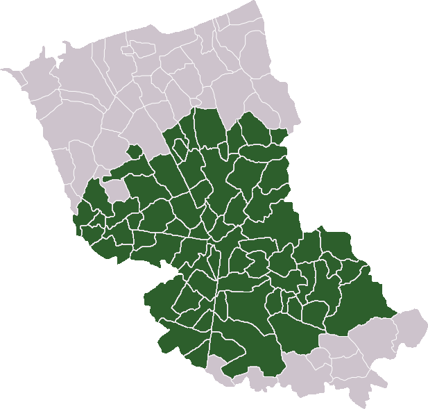 Houtland: Locatie in arrondissement Duinkerke. Zelfgemaakt. Location in the arrondissement of Dunkirk. Self made. Localisation dans l'arrondissement de Dunkerque. Fait moi-même.